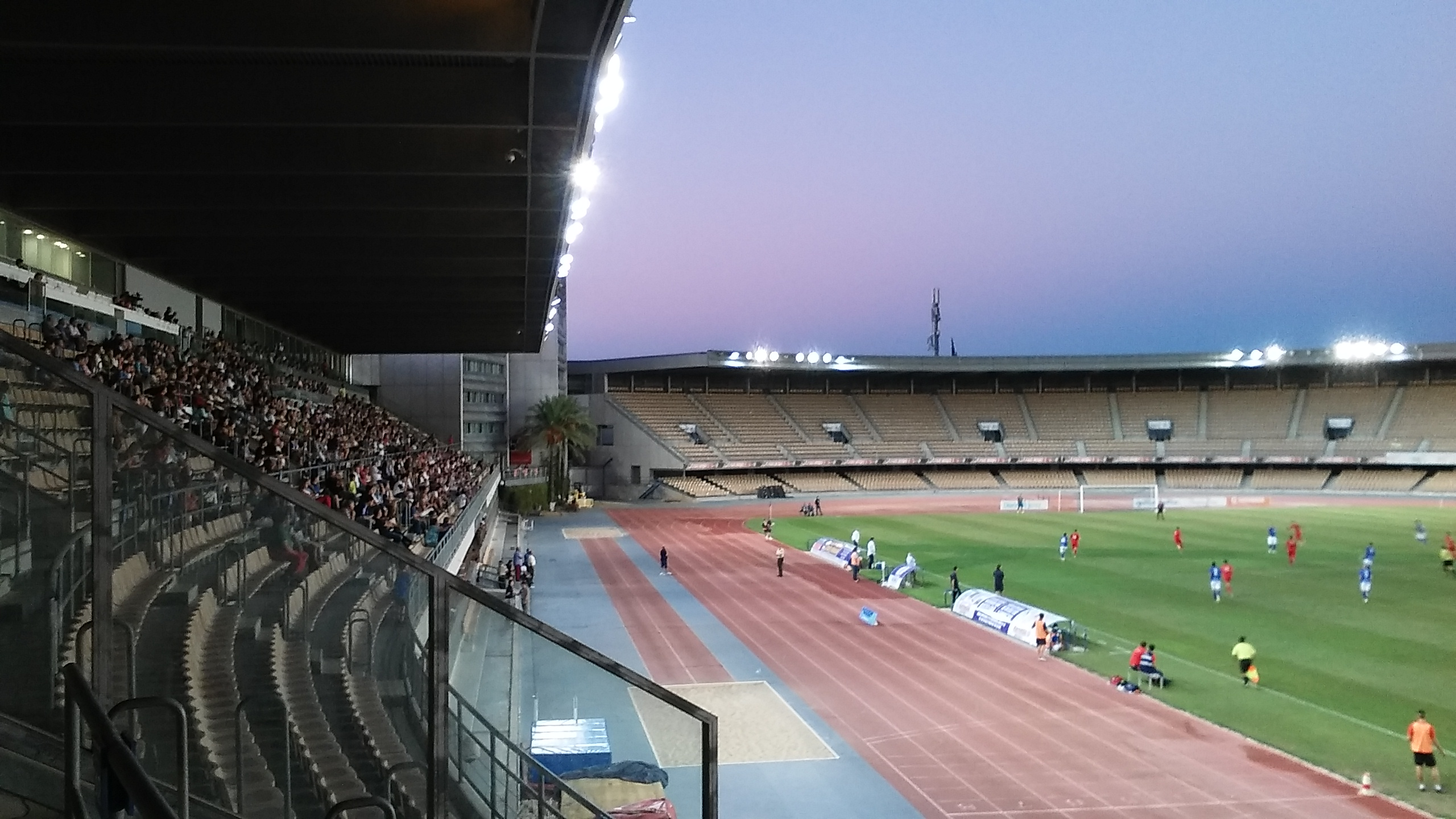 Partido Xerez DFC - UP Viso en Chapín, Jerez de la Frontera (Andalucía, España)